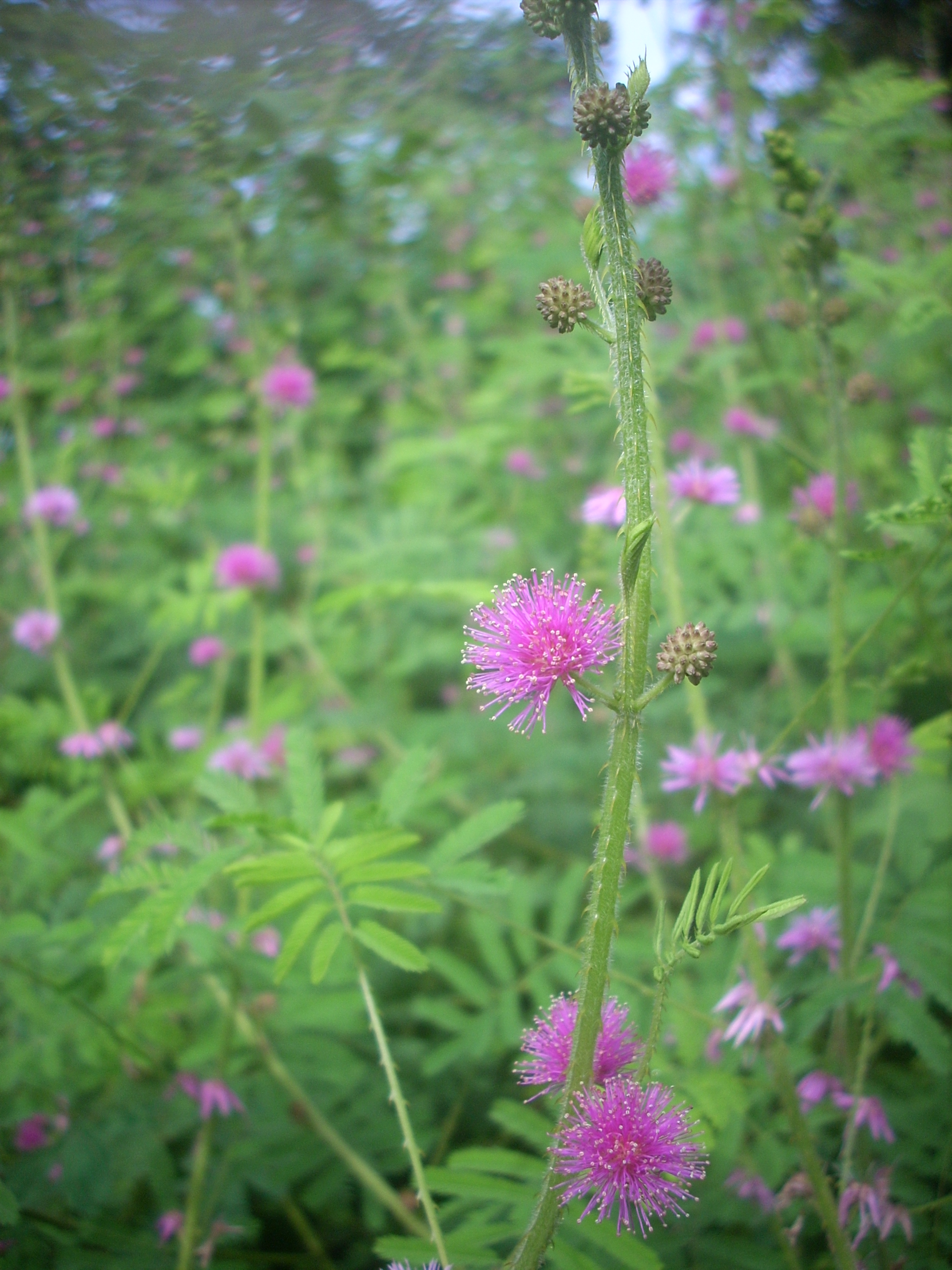 തൊട്ടാവാടിയുടെ കുടുംബത്തിൽ പെട്ടതും വിഷം ഉള്ളതും ഔഷധത്തിന് ഉപയോഗിക്കാത്തതുമായ ഒരു സസ്യമാണ്‌ ആനത്തൊട്ടാവാടി.പാണ്ടി തൊട്ടാവാടി എന്ന പേരിലും ഇത് അറിയപ്പെടുന്നു. ഇത് രണ്ട് മീറ്റർ വരെ പൊക്കത്തിൽ വളരുന്നു. ശാസ്ത്രീയനാമം: Mimosa diplotricha. ഇംഗ്ലീഷ്: Giant Sensitive plant.